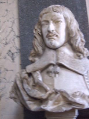 buste de la Galerie des batailles du château de Versailles